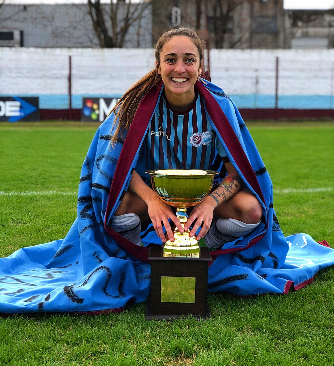 Macarena Sanchez Jeanney, jugadora de UAI Urquiza.